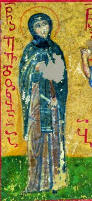 Прмц. Евдокия. Фрагмент миниатюры из греко-груз. рукописи. XV в. (РНБ. Q.I.58. Л. 102)